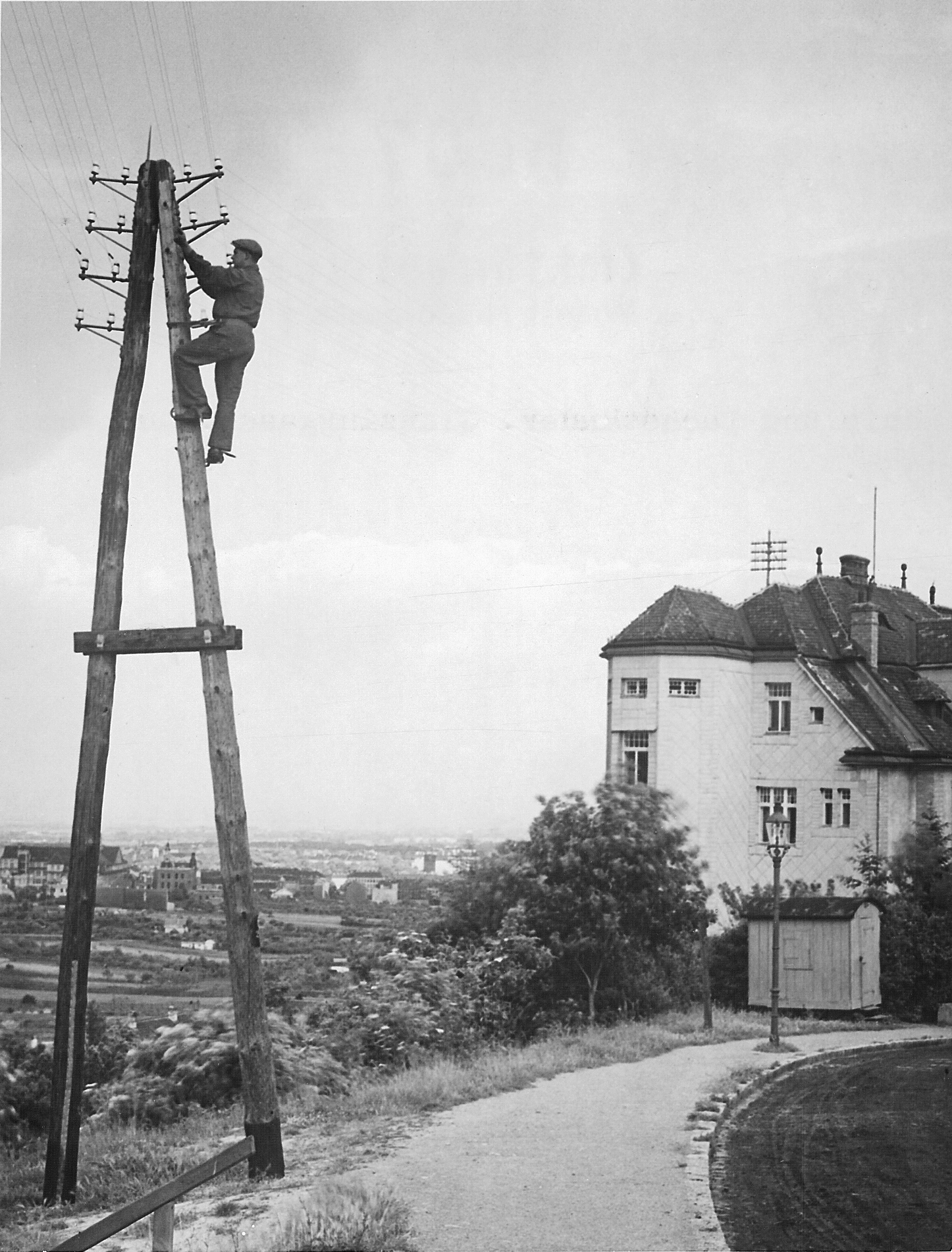 Oberirdische Telefonleitung. Säule und Dachständer in Wien, in der Glanzinggasse, 1931